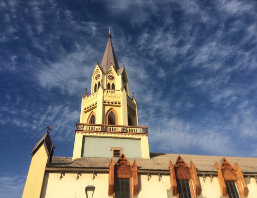 Iglesia de San Vicente de Paul